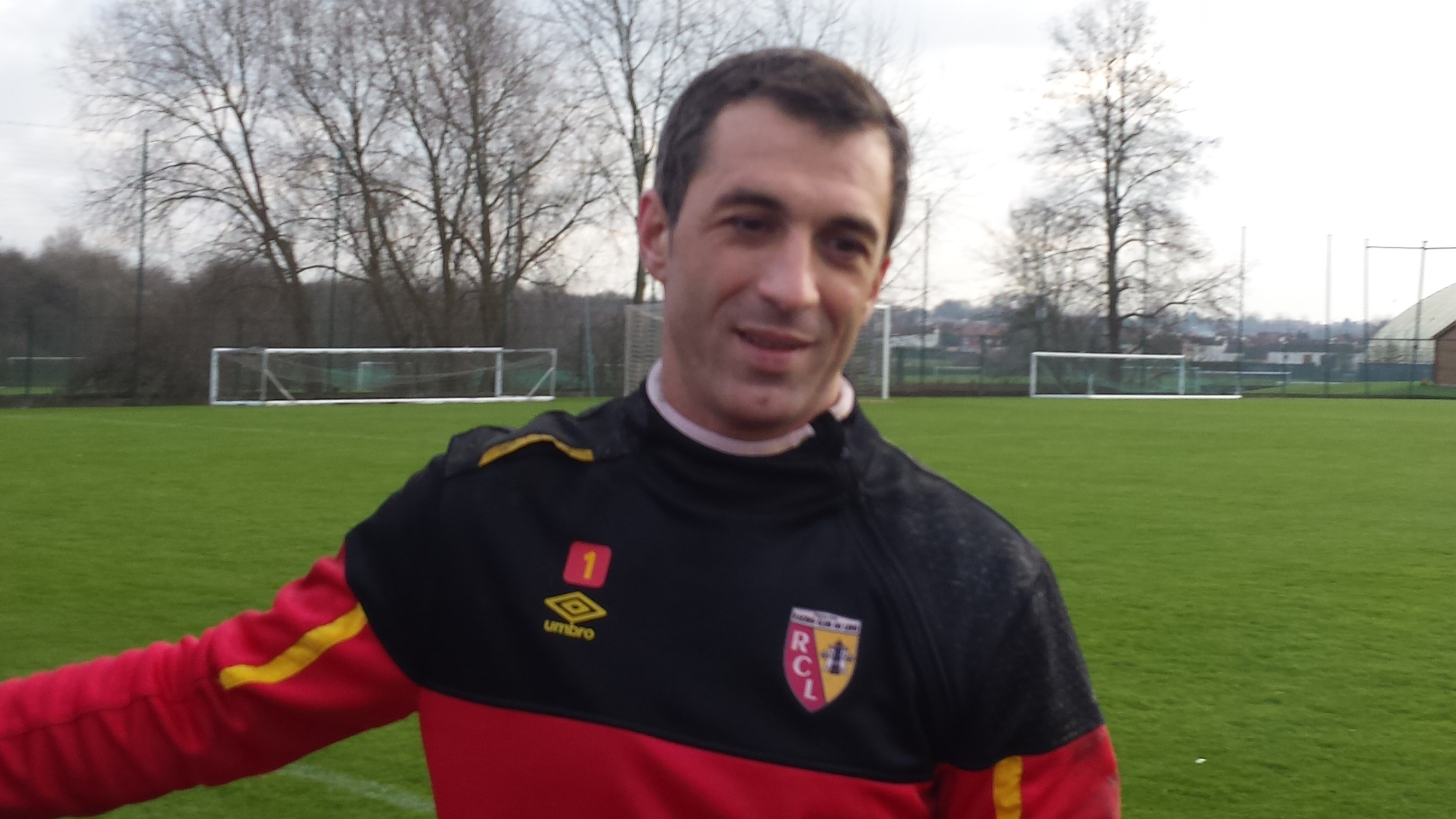 Rudy Riou après un entraînement public du Racing Club de Lens, le 31 décembre 2014, sur le terrain "San Siro" du Centre Technique et Sportif de La Gaillette.